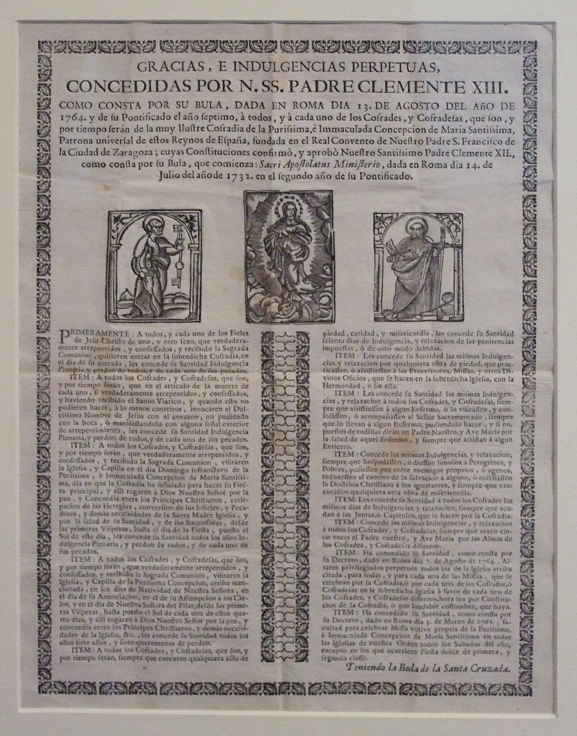 Anónimo, Gracias e indulgencias de la cofradía de la Purísima e Inmaculada Concepción Último tercio del siglo XVIII Colección Aubá, Zaragoza